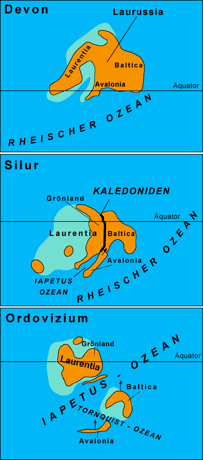 ...Prinzipdarstellung der paläogeographischen Entwicklung von Avalonia, Baltica und Laurentia von Ordovizium bis Devon Vorlagen: Diese vom Autor erstellte Zeichnung ist ein Auszug aus einem von ihm selbst konzipierten und gezeichneten vollständigen paläogeographischen Kartenwerk.